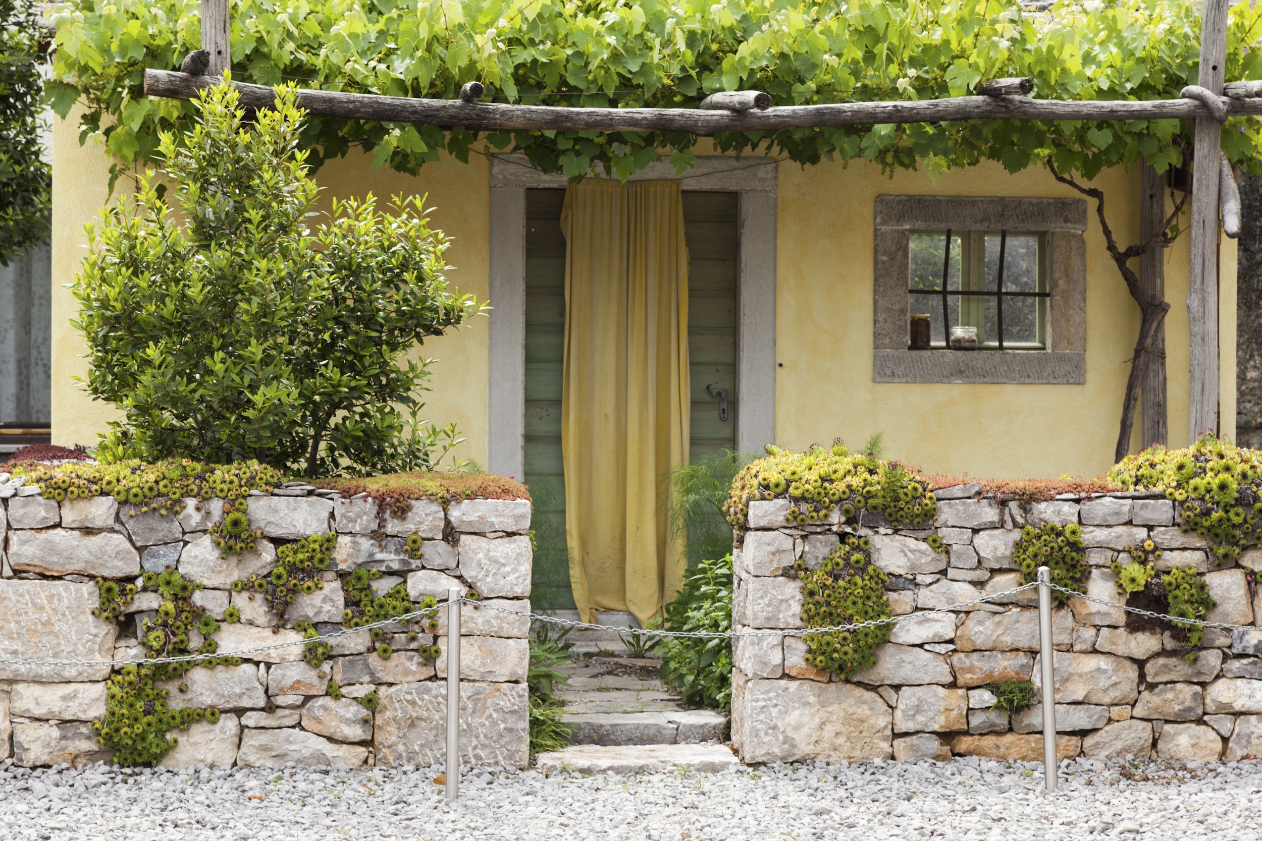 Pepin kraški vrt